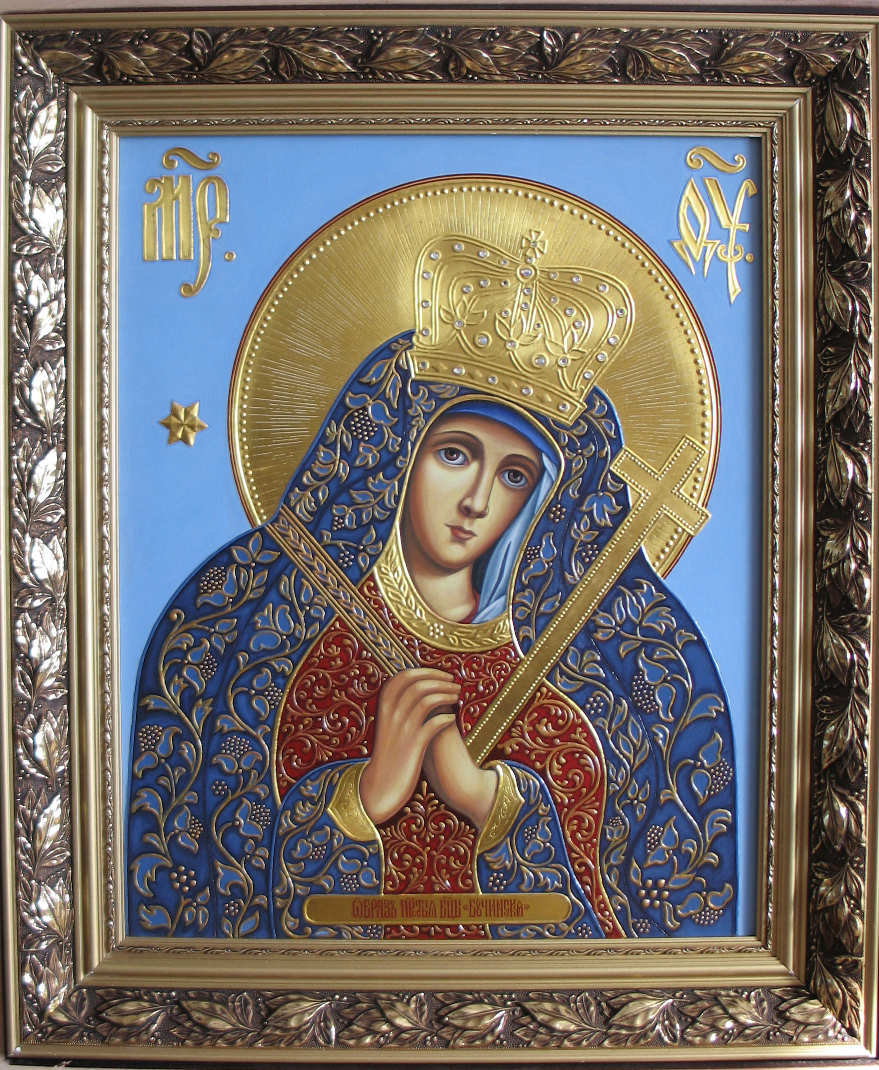 Список з Бучинської Ікони Божої Матері